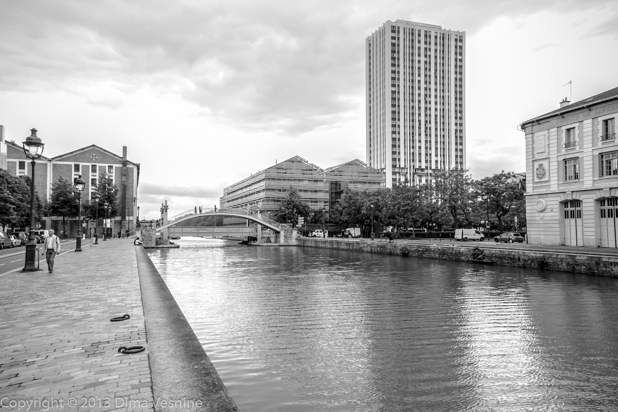 Canal Saint-Martin, Pont levant de la rue de Crimée à Paris